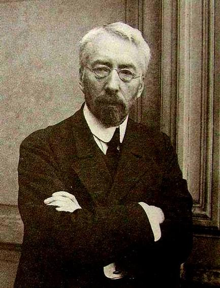 Русский революционер, разоблачитель провокаторов Владимир Львович Бурцев (1862-1942)